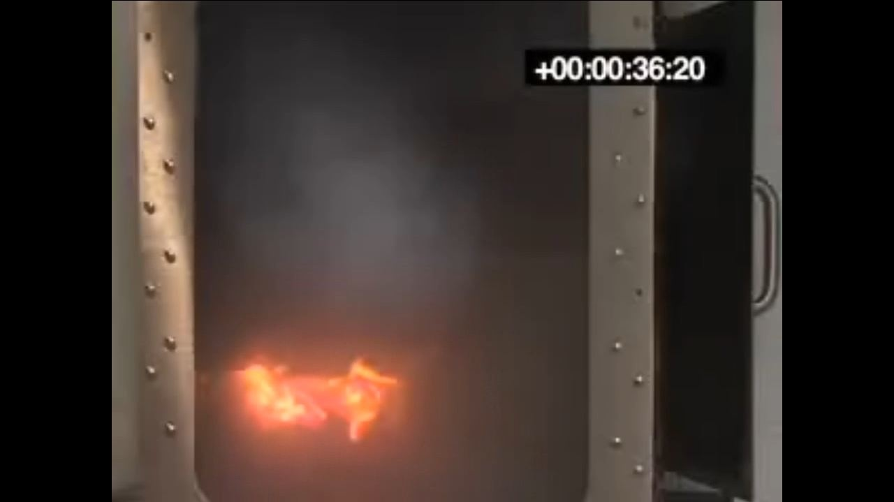 Small enclosure fire test